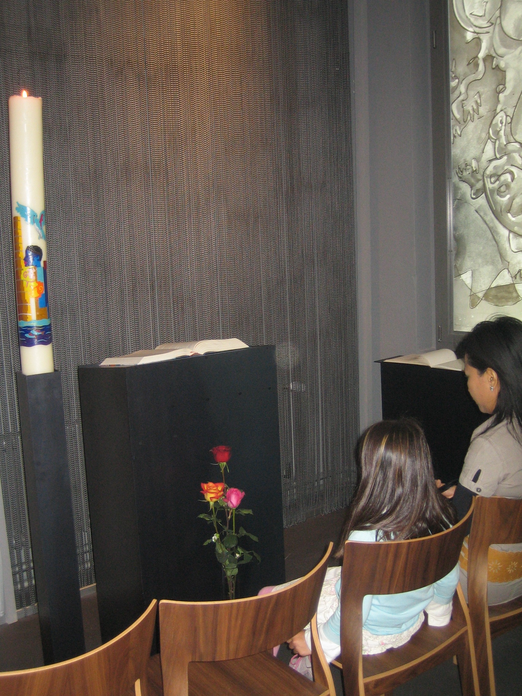 Ein Blick ins Innere der Sihlcity-Kirche in Zürich. - Foto: Jakob Vetsch, 31. März 2007.